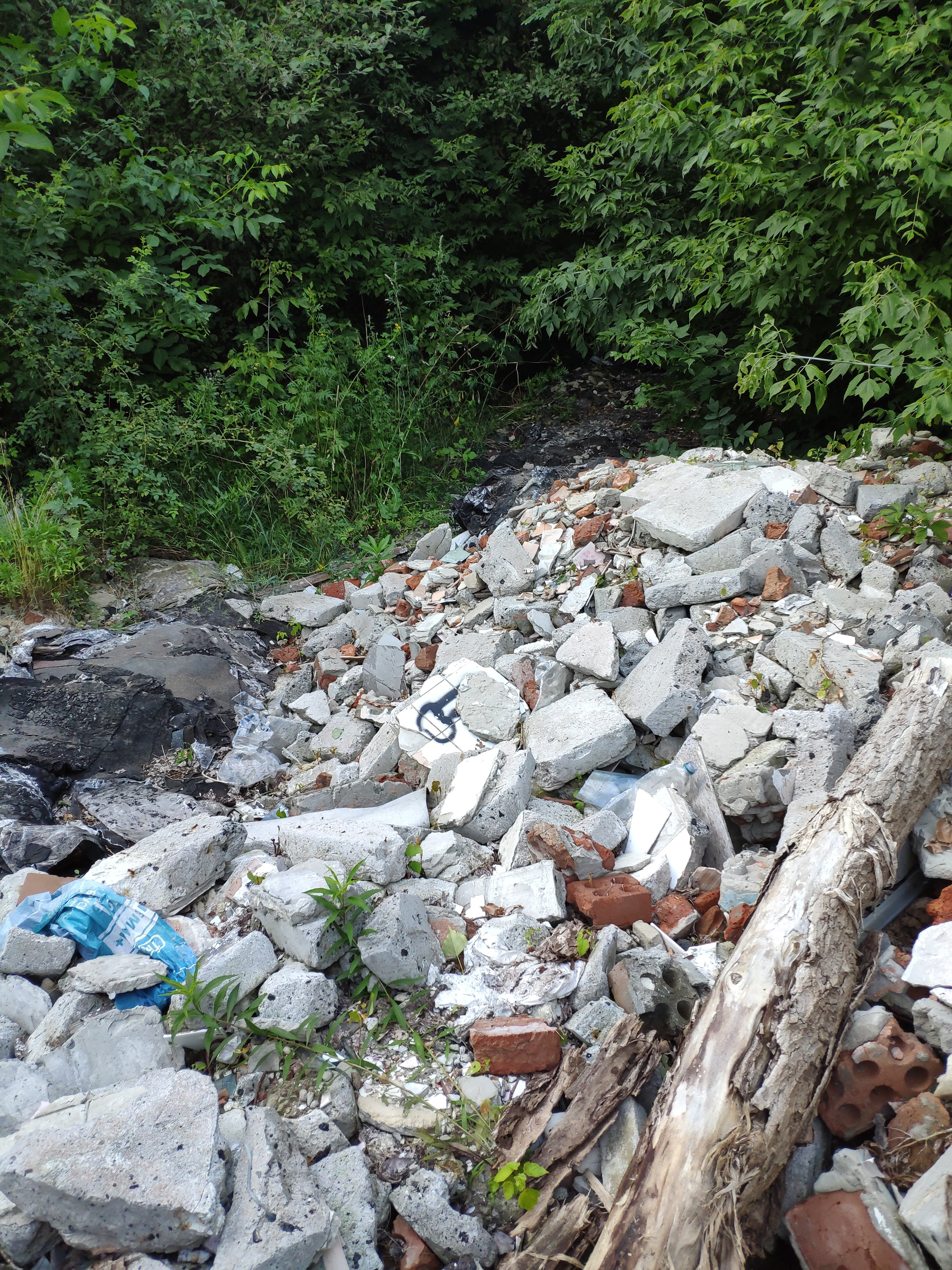 Артилерійські склади використана цегла